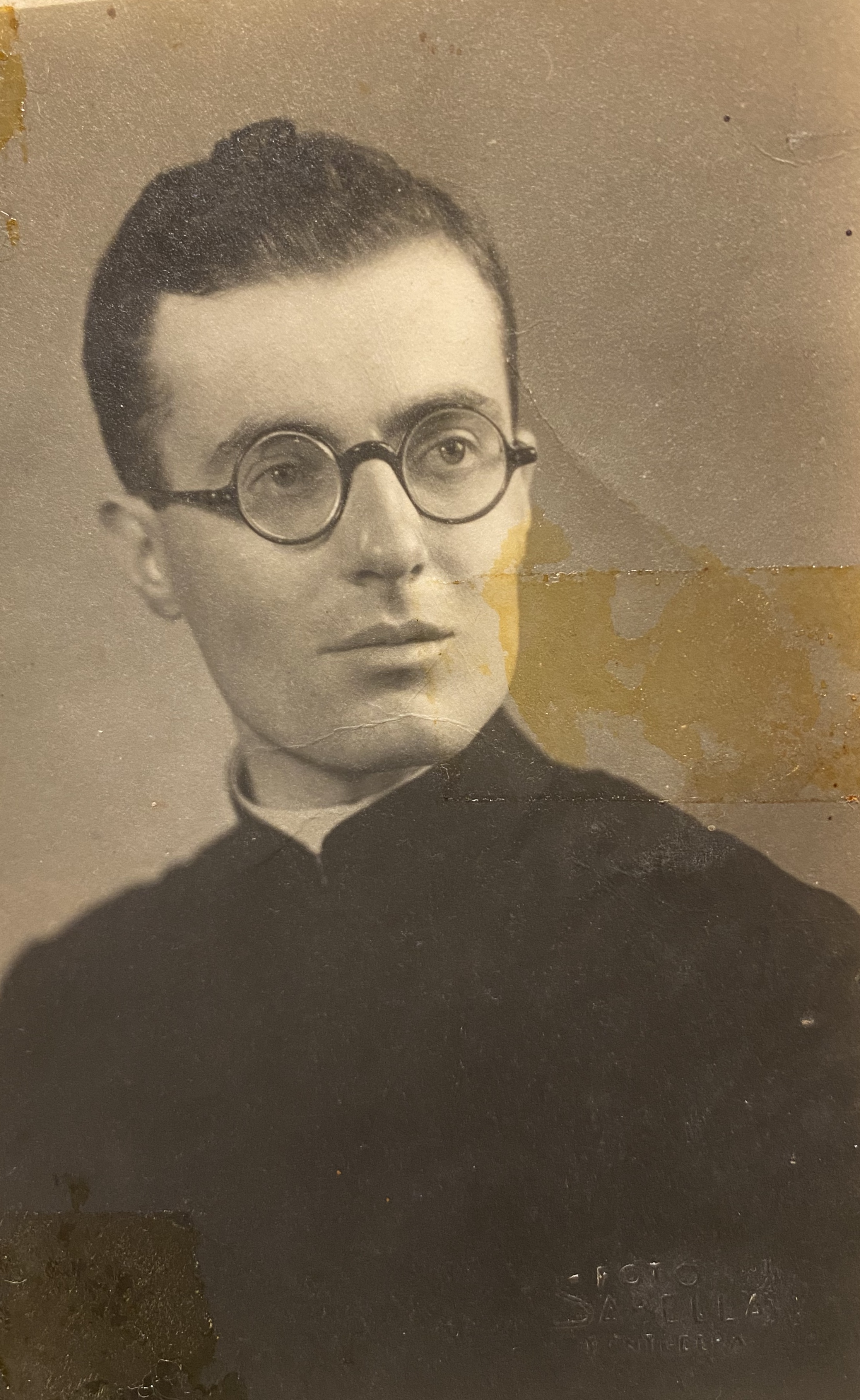 Ritratto di Don Libero Raglianti